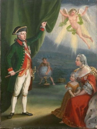 Antonín Machek (1775–1844): Kaiser Joseph II. (1765–1790), Öl, 36,5 x 27 cm, zwischen 1828 und 1835, Národní galerie v Praze (Nationalgalerie Prag).